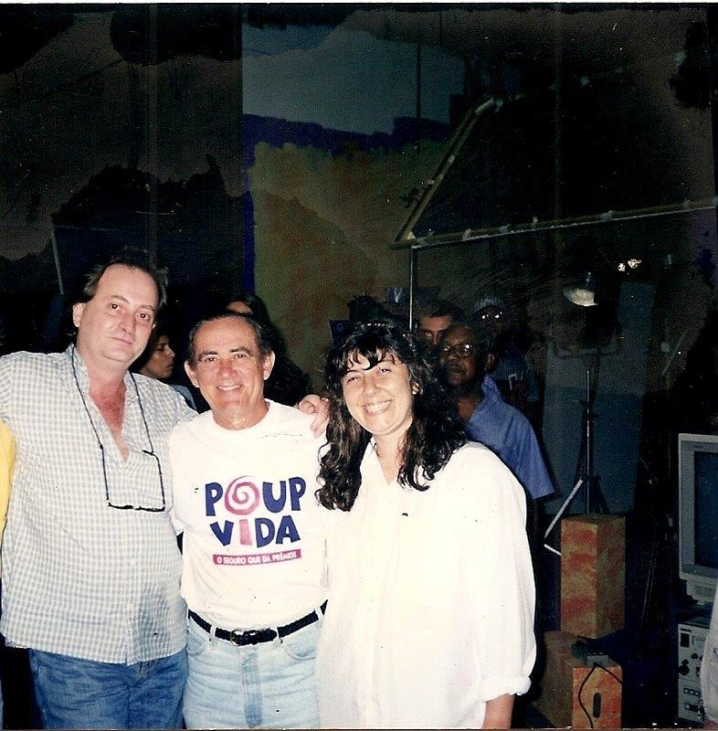 Alexander Tanko, Renato Aragão (Os Trapalhões) e VâniaBalvez na J. B. Tanko Filmes Ltda - 1991 - Rio de Janeiro - Brazil